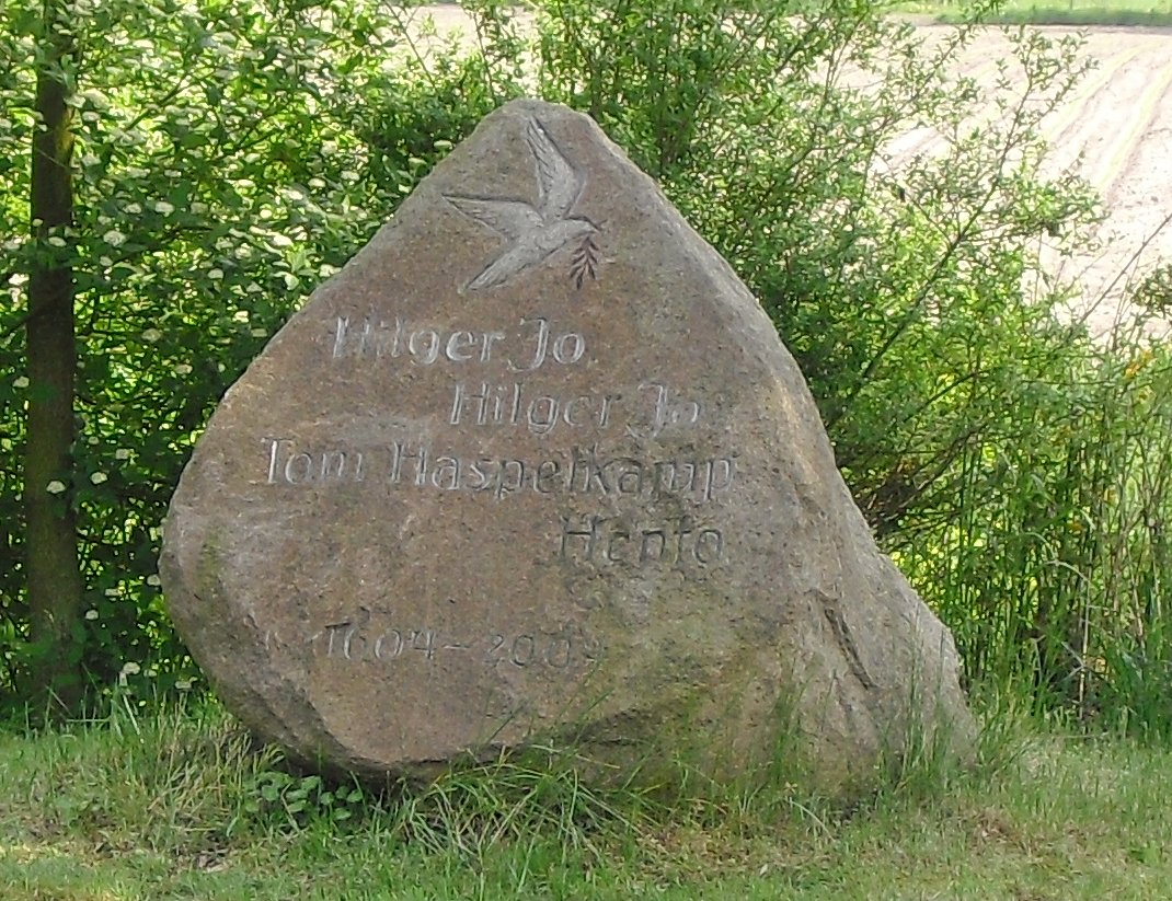 Gedenkstein der Schlacht am Haspelkamp 1604 Inschrift: Hilger Jo, Hilger Jo, Tom Haspelkamp Hento. 1604–2004